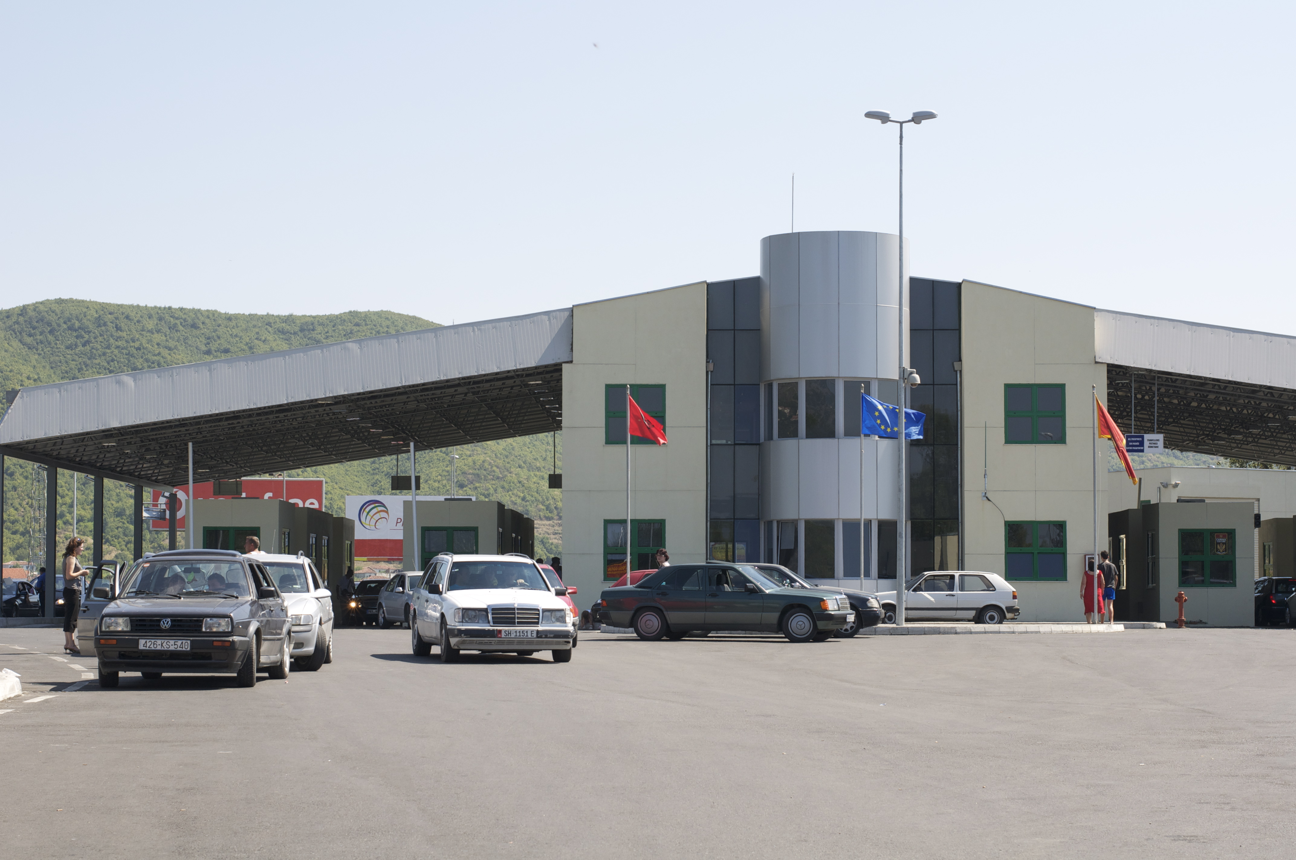 Border between Albania and Montenegro at Muriqan